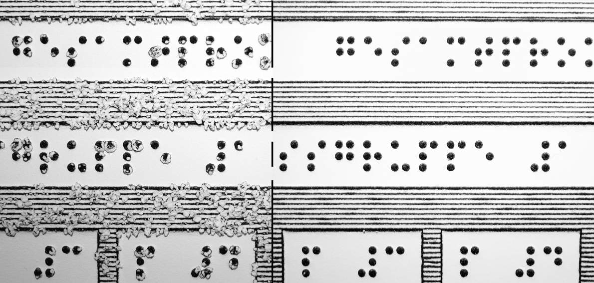 Gegenüberstellung von zwei Schwellkopien (Detailausschnitt). Die linke Schwellkopie wurde zu lange erhitzt, die Kapseln unter der schwarzen Tinte quollen zu stark auf und platzten. Die rechte Schwellkopie wurde korrekt erwärmt, doch auch hier sind kleine Fehler zu erkennen.